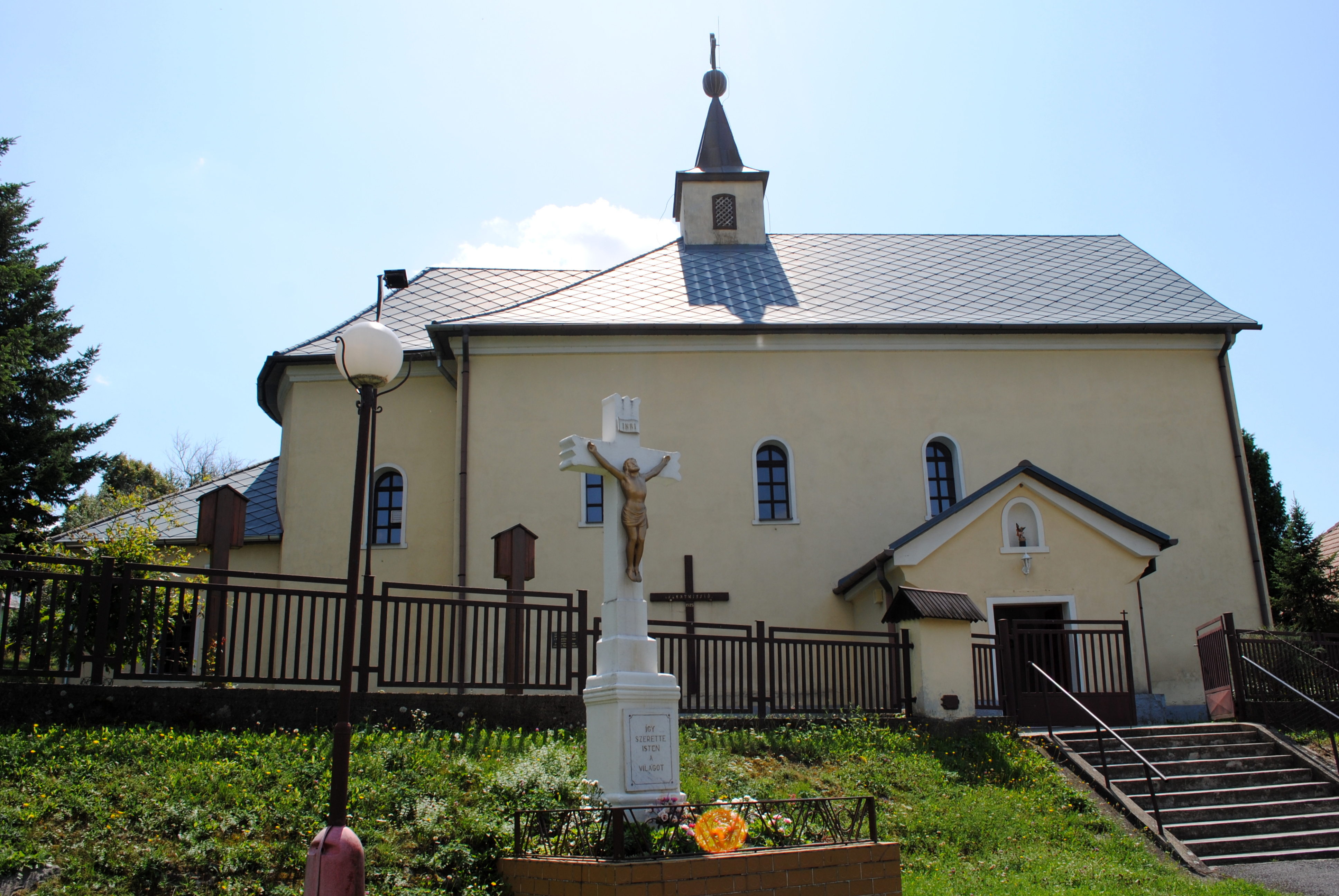 Ipolyfödémes